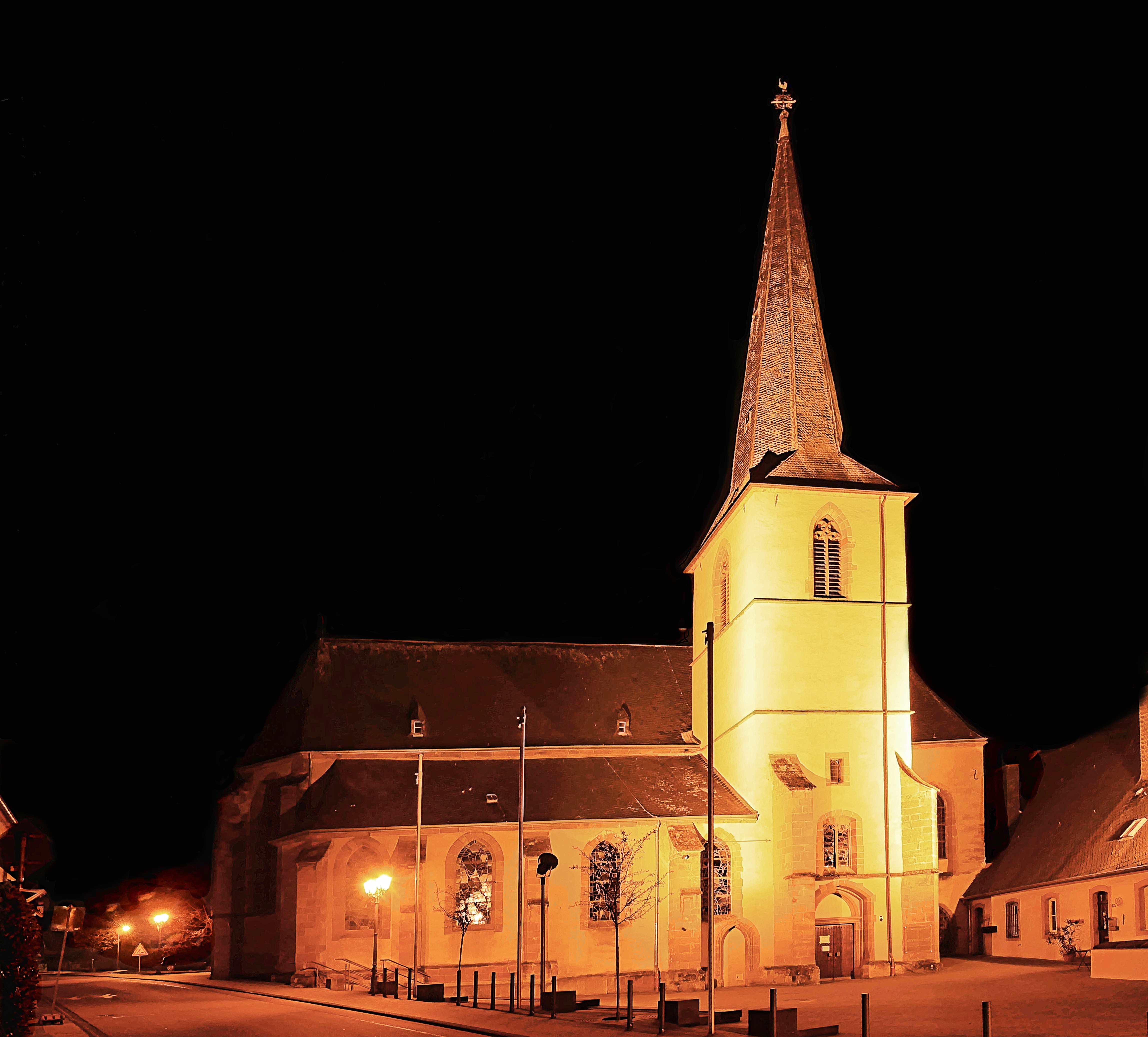 Saarburg (Kreis Trier-Saarburg) im Ortseil Beurigː Katholische Pfarr- und Wallfahrtskirche Mariä Heimsuchung, spätgotische zweischiffige Hallenkirche, 1516, Gnadenkapelle 1479